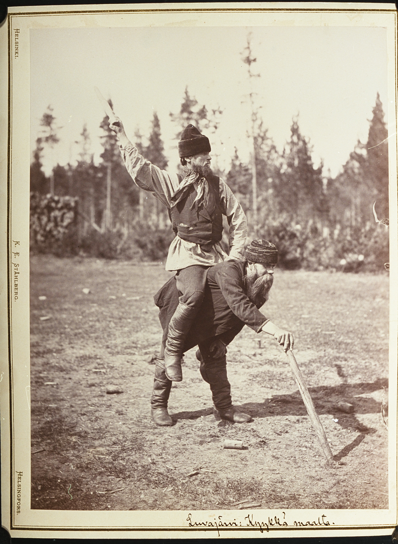 Karelian skittles